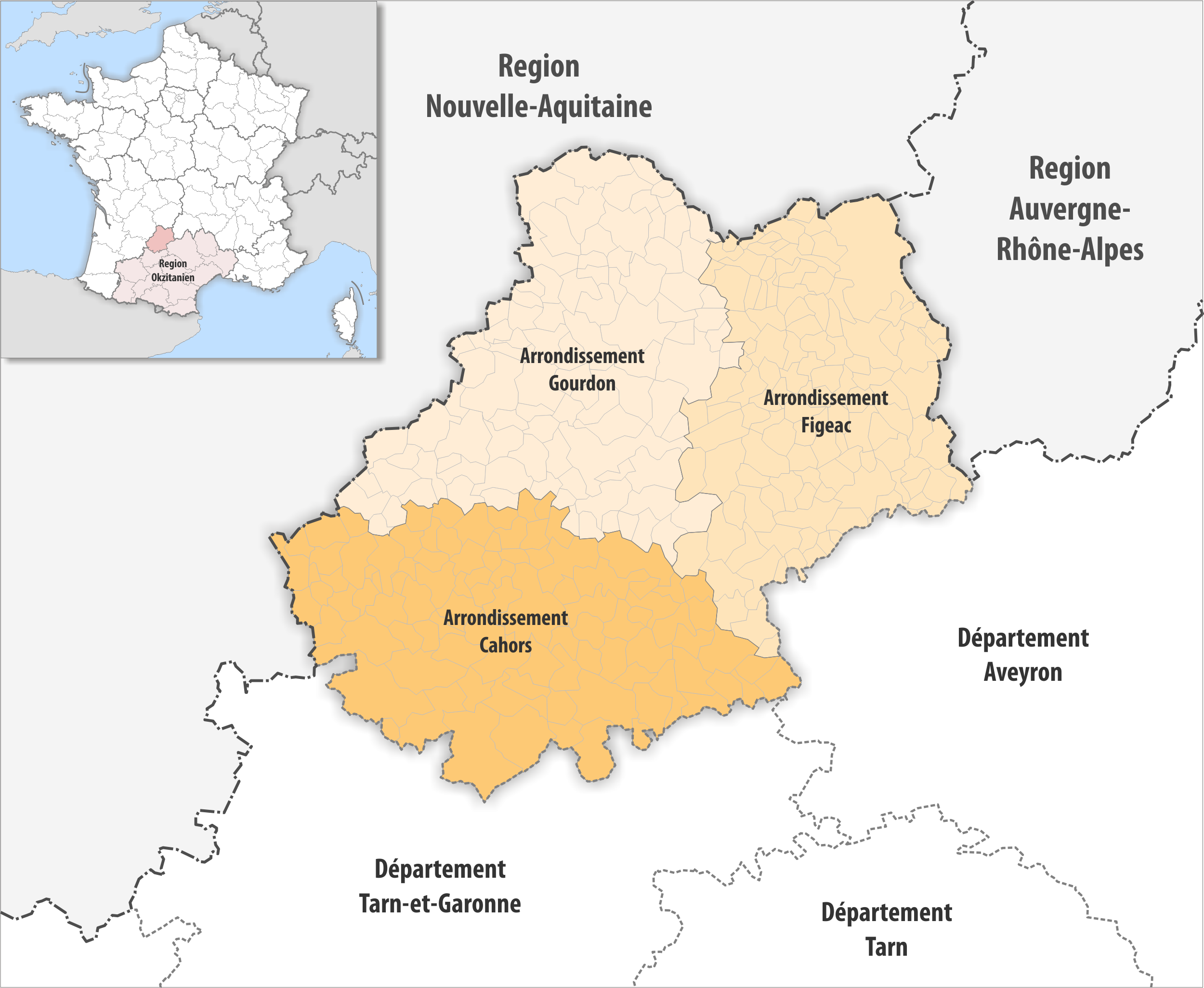 Gemeinden und Arrondissemente im Departement Lot